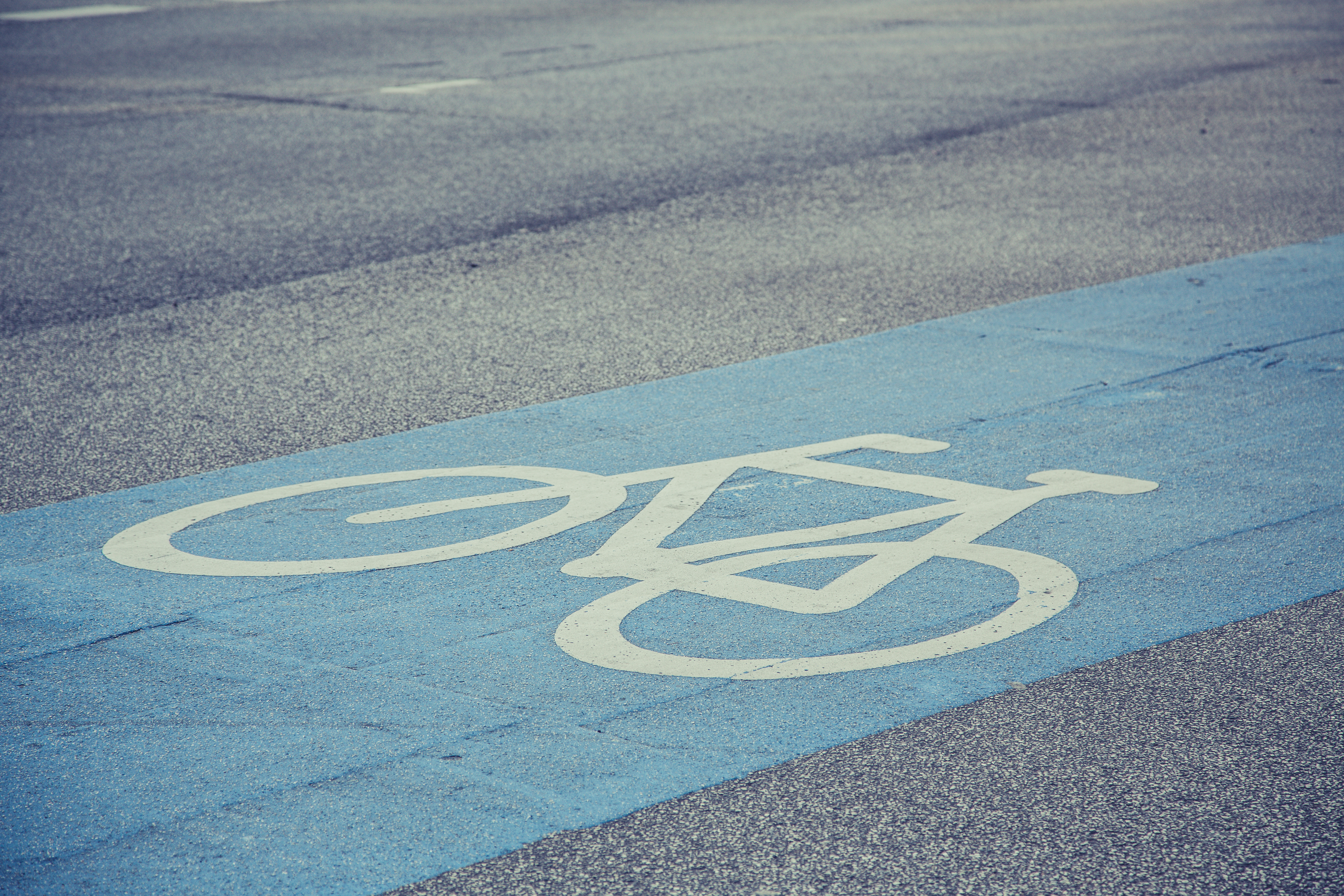 Copenhagen, Denmark Licensing